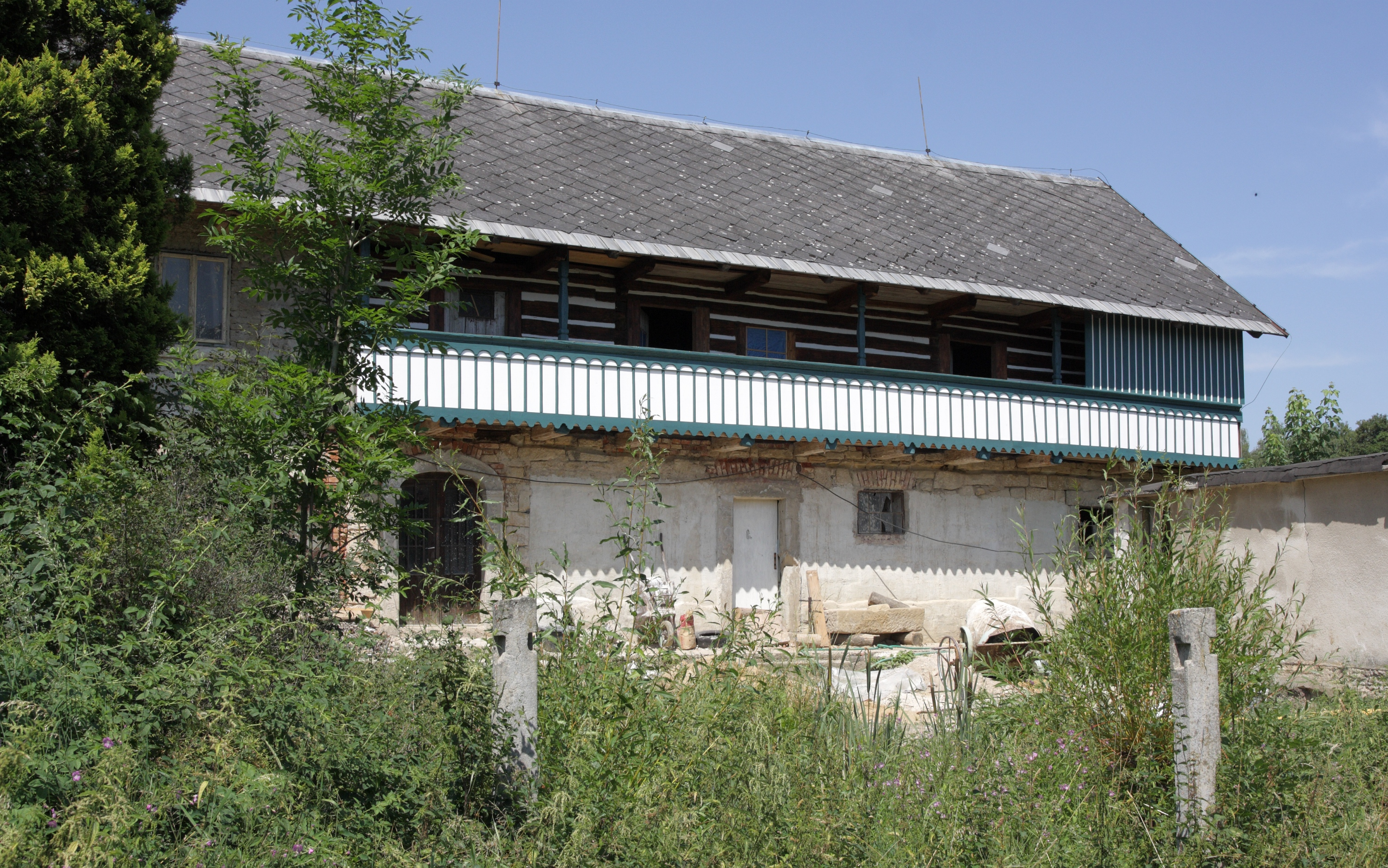 Voděrady - Mužákův statek č. p. 2 z 20. let 19. století.